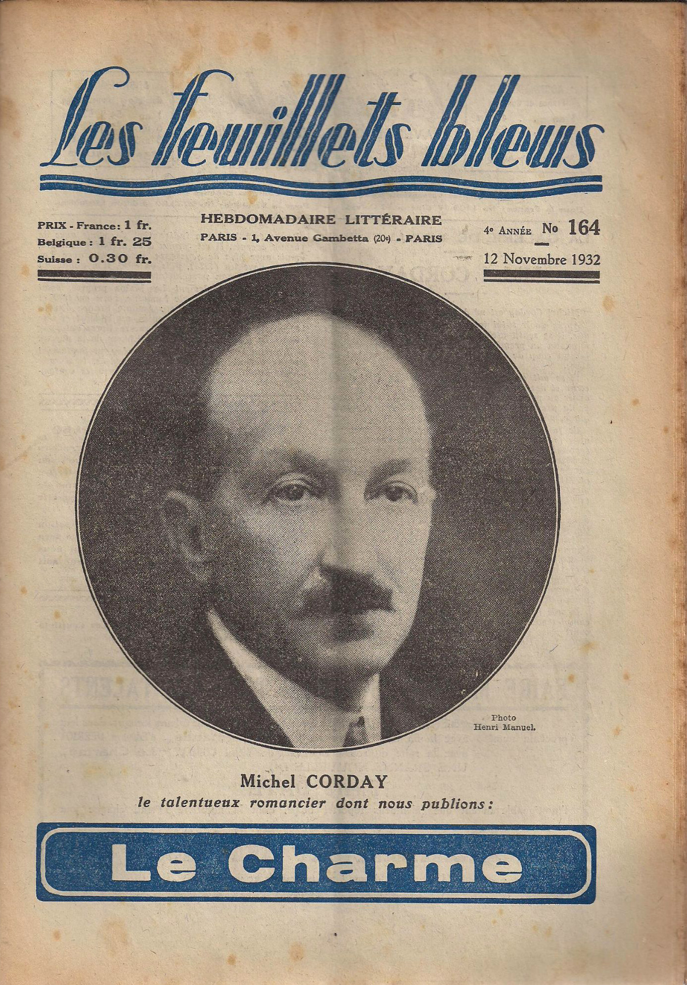 Couverture de la revue Les Feuillets bleus n° 164, du 12 novembre 1932 : pour Le Charme de Michel Corday.